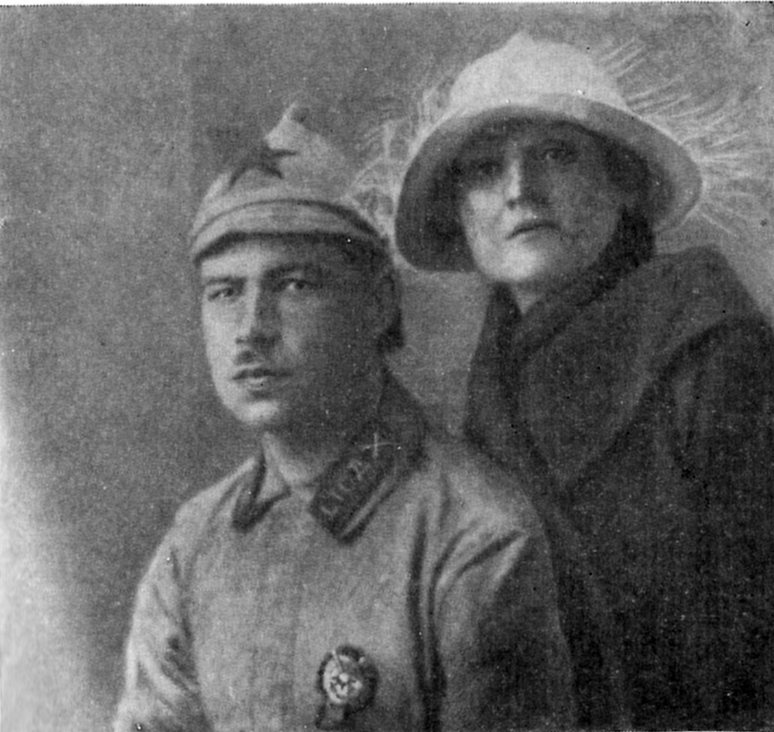 Говоров, Леонид Александрович с женой, 1923